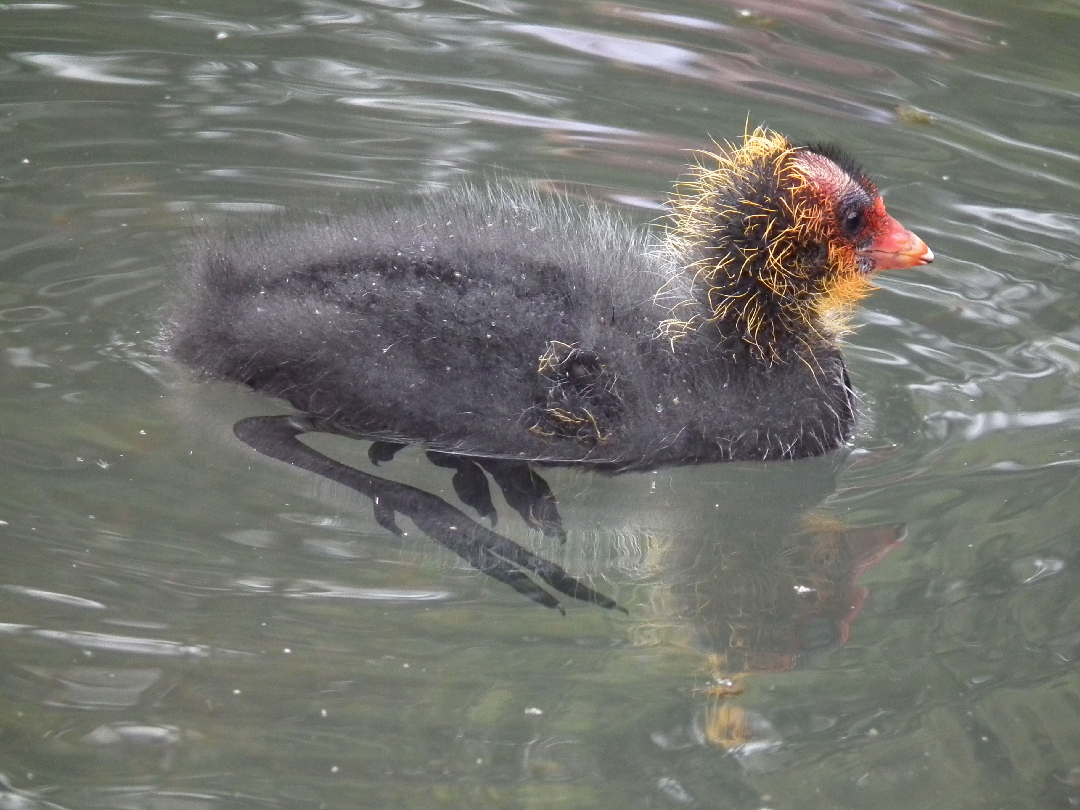 Küken eines Bläßhuhns (Fulica atra)